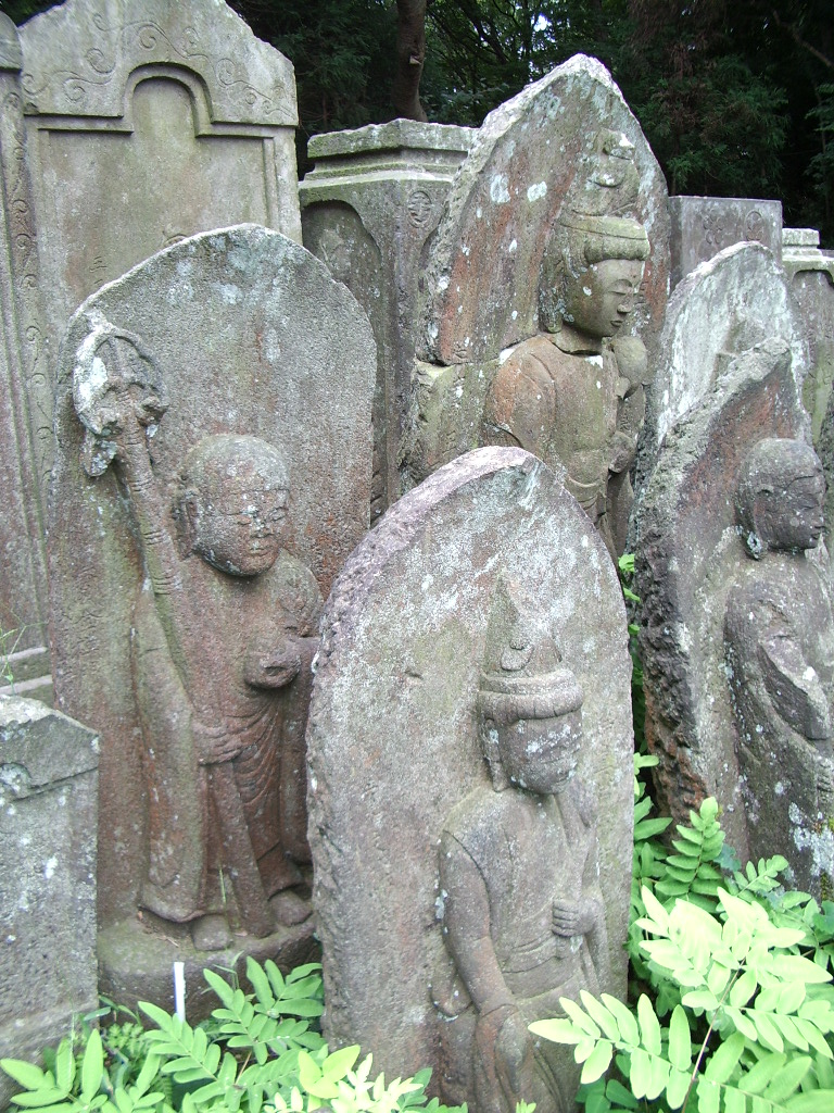 arigatayama, yanoguchi, inagi, japan